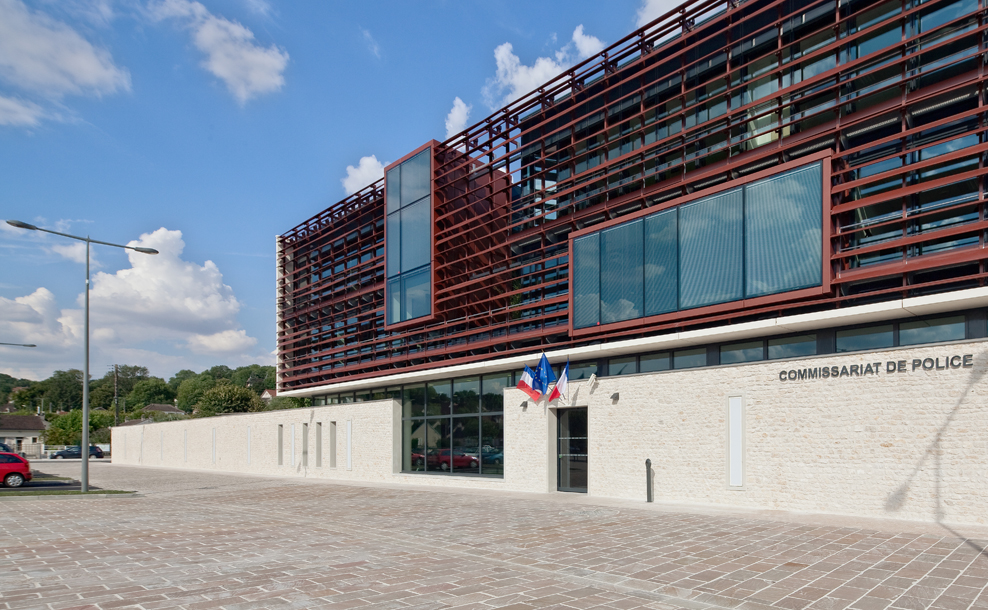 Commissariat de police de Provins (Seine-et-marne) en France. Philippe Ameller et Jacques Dubois architectes - architectes assistants : Guita Maleki, Marie Warburton, Renaud Djian. Inauguré le 13 juillet 2009. Site classé par l'Unesco au patrimoine de l'humanité.